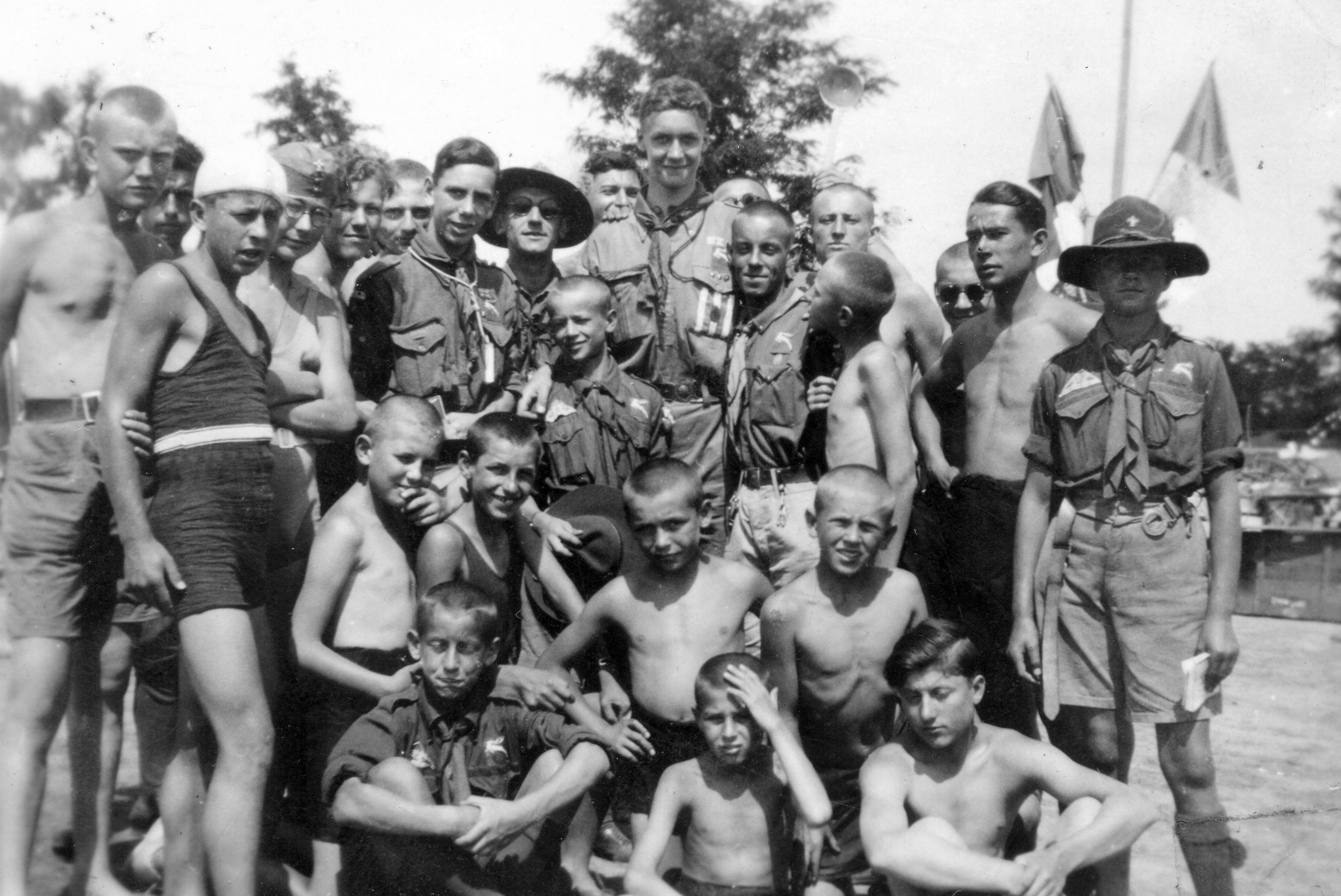 4. Nemzetközi Cserkész Világtalálkozó (Jamboree). Location: Hungary, Gödöllő Tags: uniform, tableau, hat, scouting Title: 4. Nemzetközi Cserkész Világtalálkozó (Jamboree).